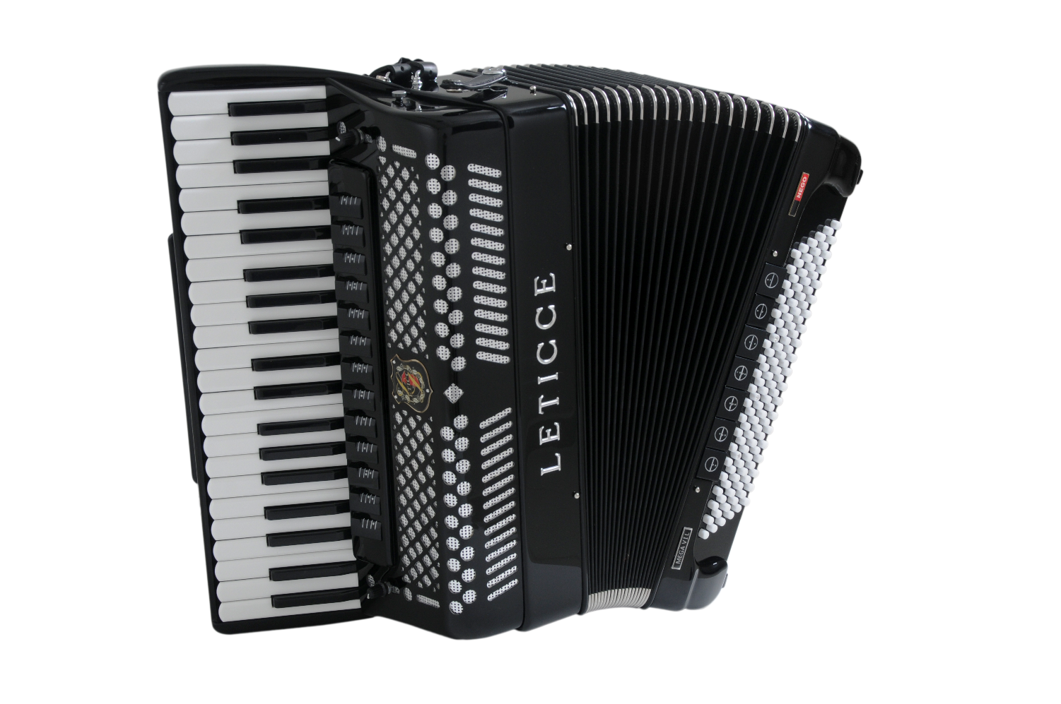 Acordeon Leticce, modelo Mega 6ª L, 120 baixos em 4ª voz com cassoto duplo. Fabricado em Campina Grande, Paraíba.